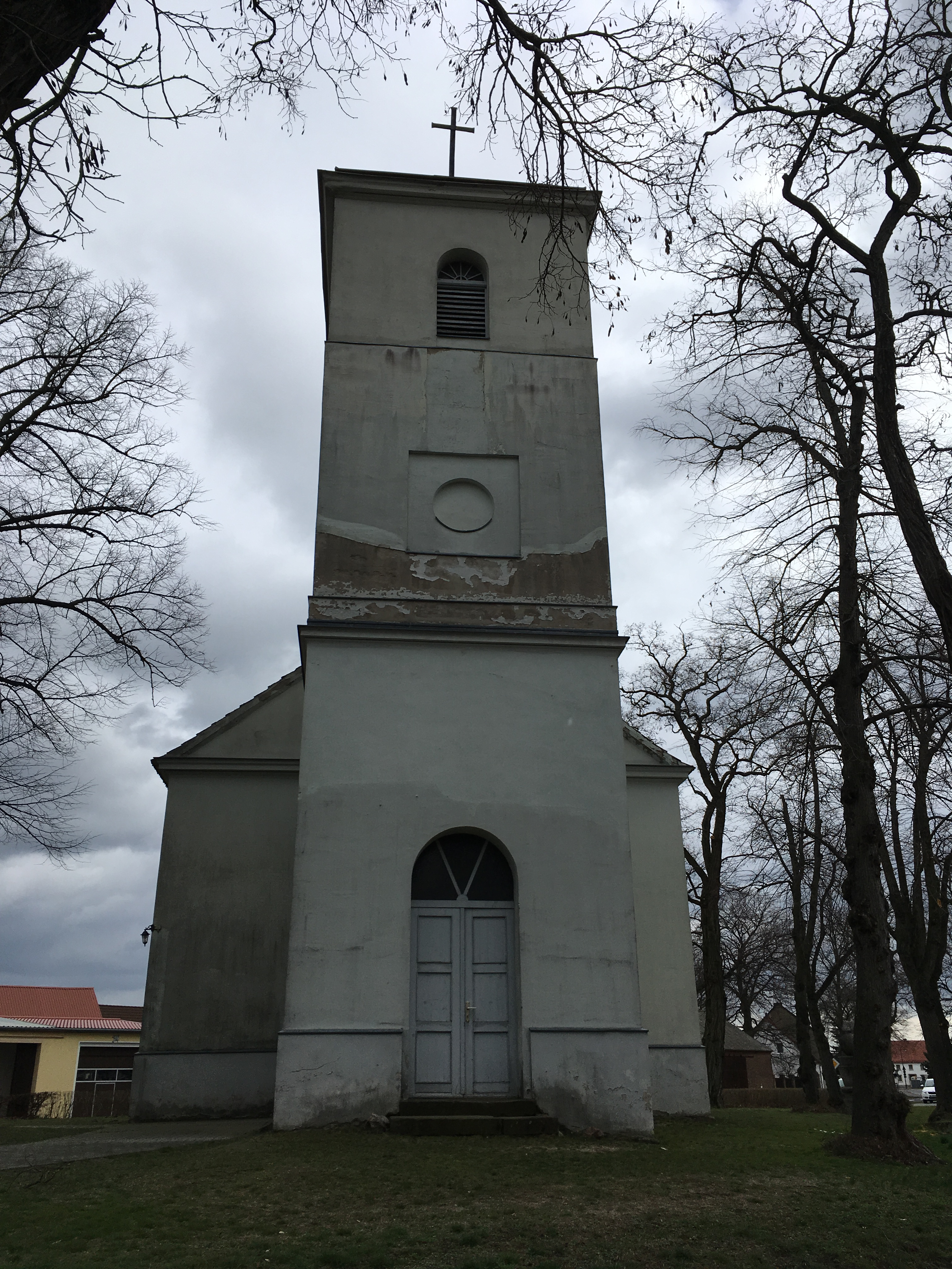 Die Dorfkirche Jänickendorf entstand in den Jahren 1833 bis 1835 im Rundbogenstil. Sie steht auf dem historischen Dorfanger in Jänickendorf, Gemeinde Nuthe-Urstromtal in Brandenburg.